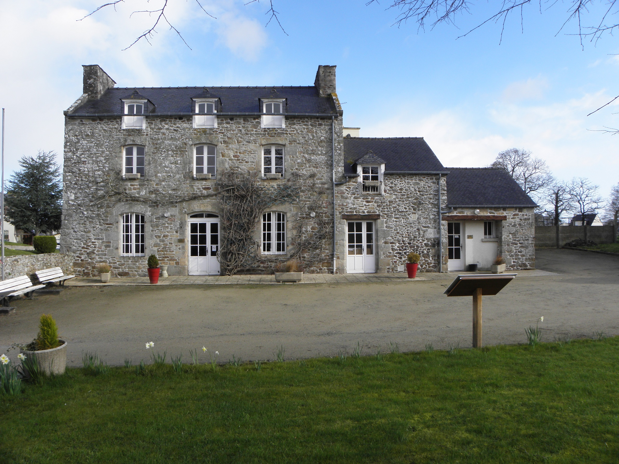 Mairie de Saint-Michel-de-Plélan (22).